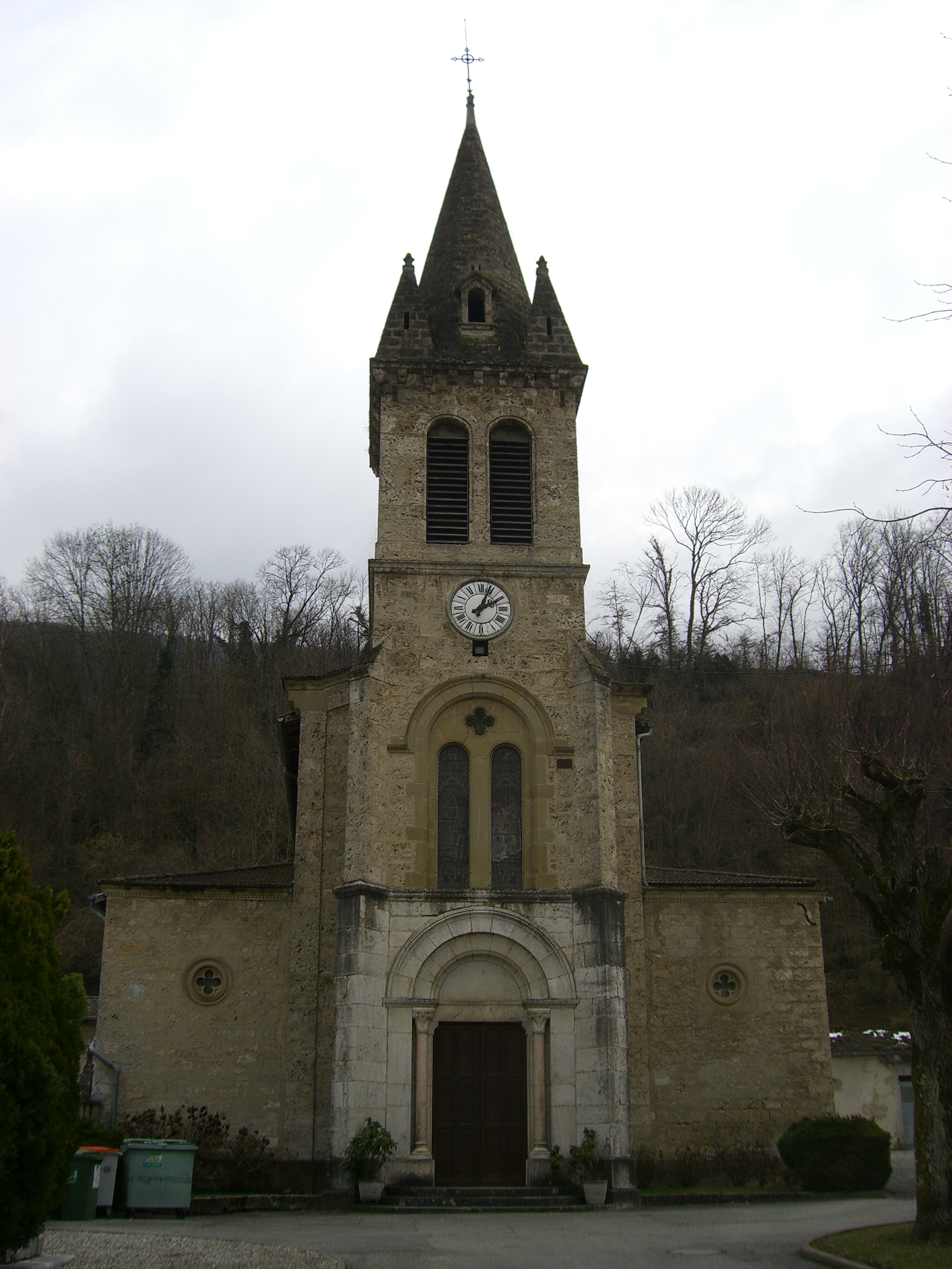 L'église d'Izeron.